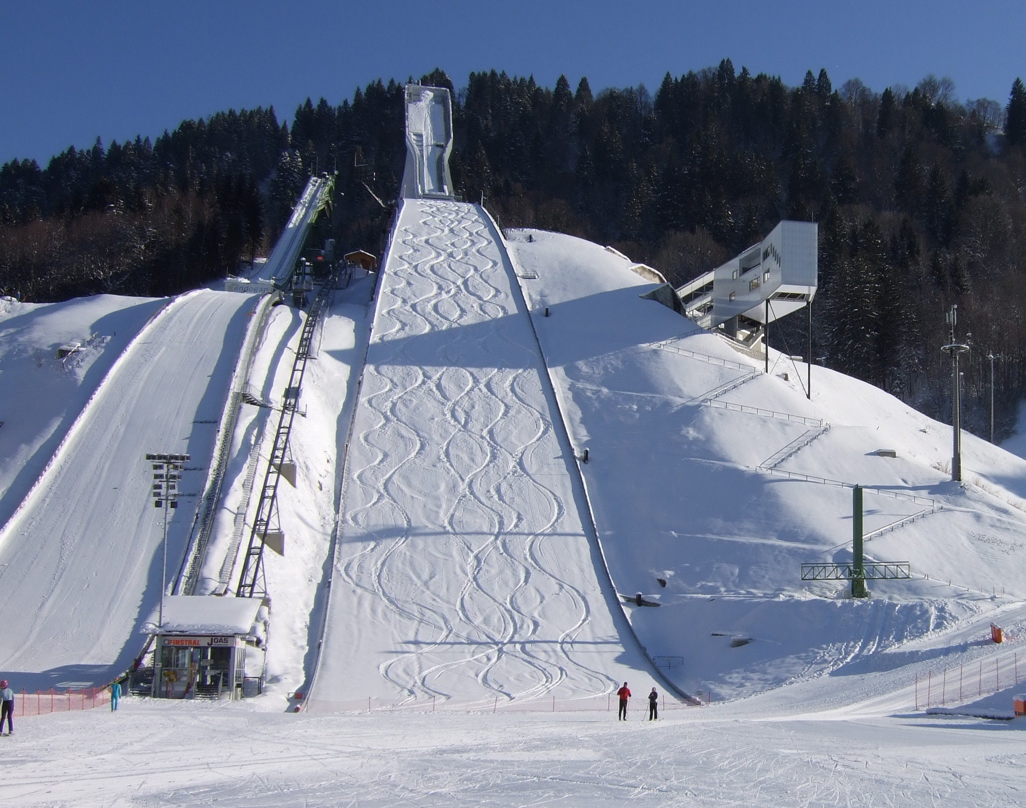 Große Olympiaschanze in Garmisch-Partenkirchen